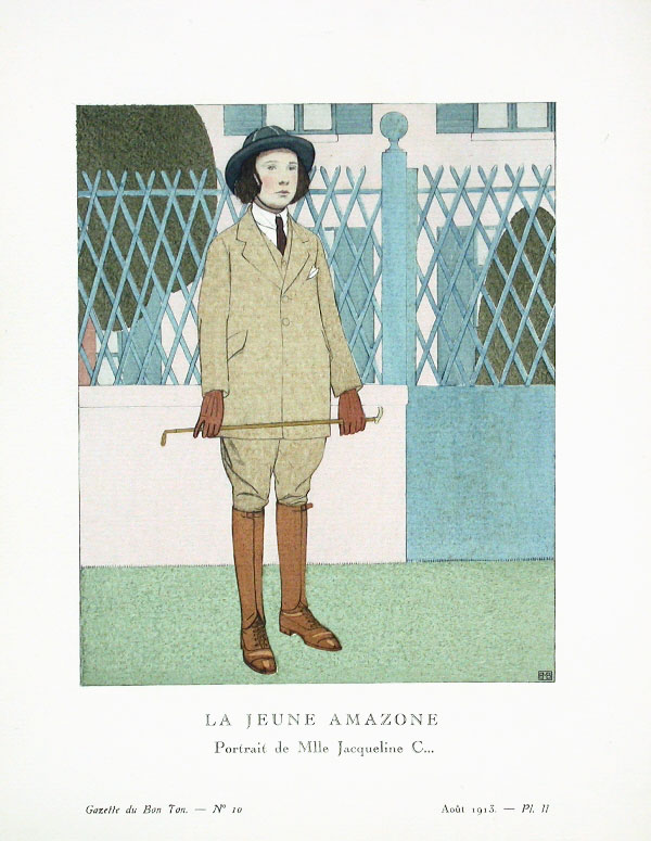 Illustration from La Gazette du Bon Ton. Title: "La Jeune Amazone"